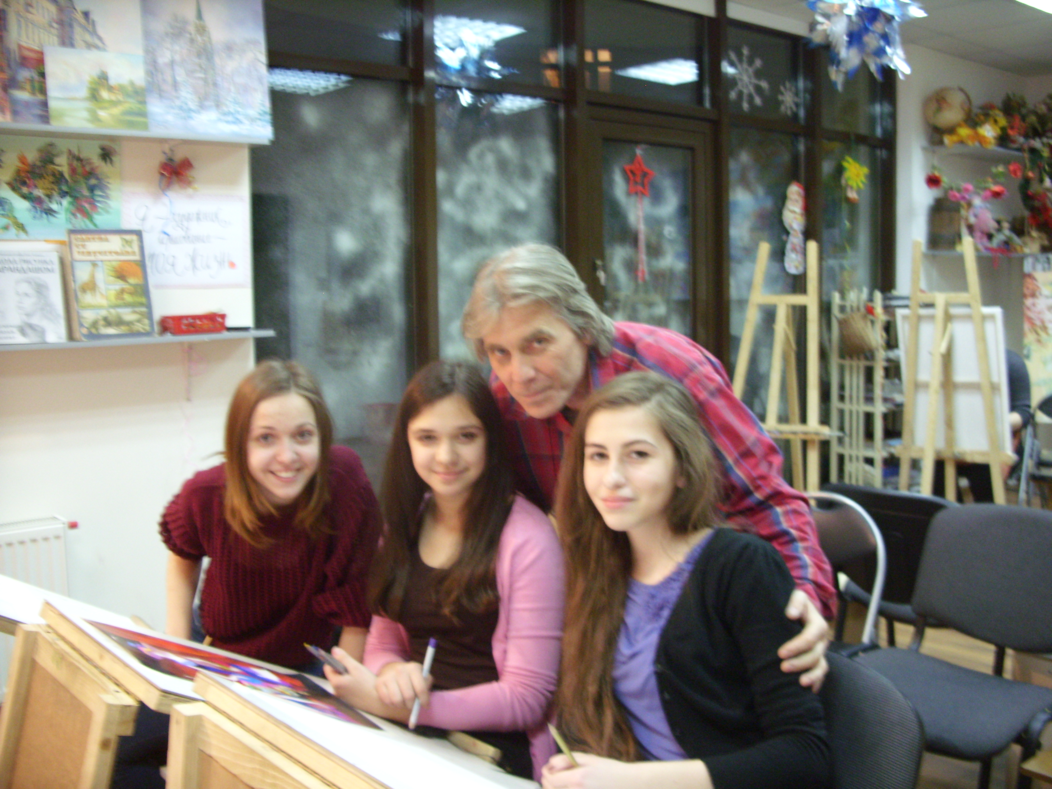 Сопко Юрій Андрійович під час роботи на студії "Жива фарба"